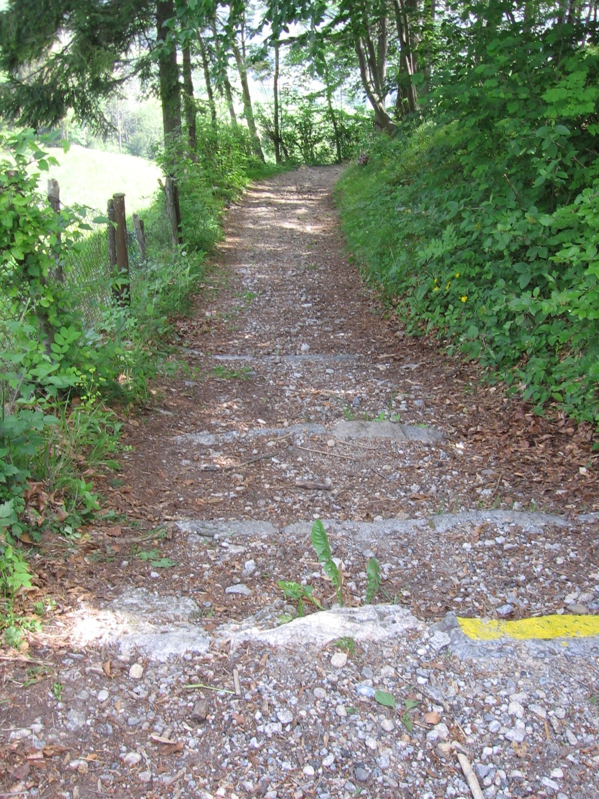 via Mercatorum, Dossena, Bergamo, Italia